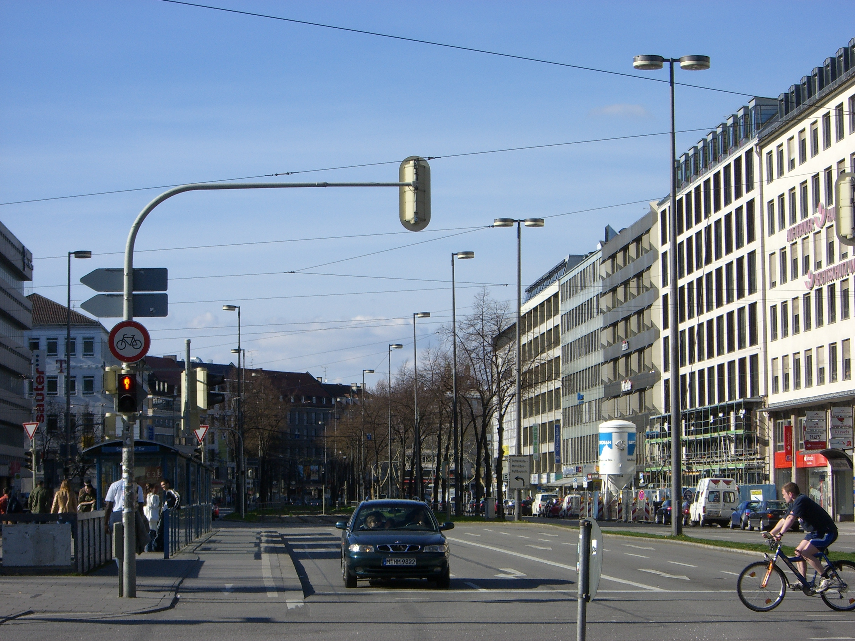 München: Altstadtring (Sendlinger-Tor-Platz)